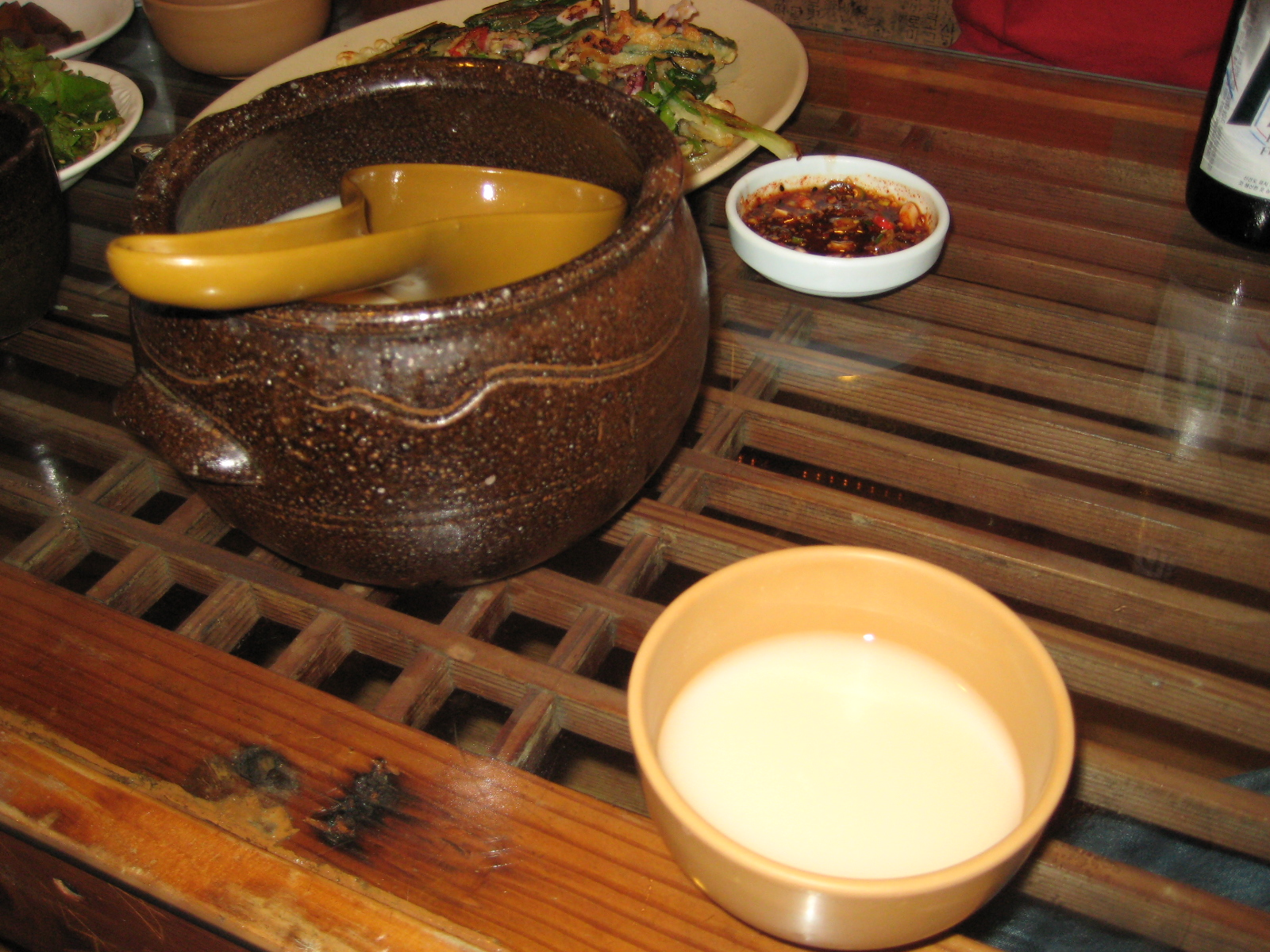 Korean drink-Dongdongju